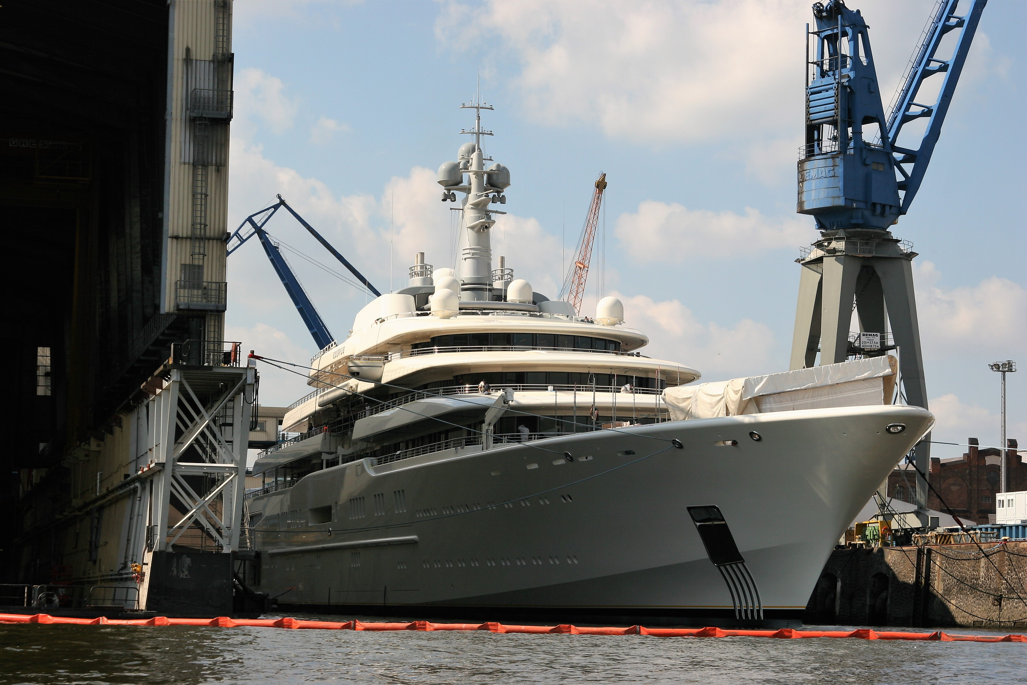 Die Mega-Yacht Eclipse am Dock in Hamburg